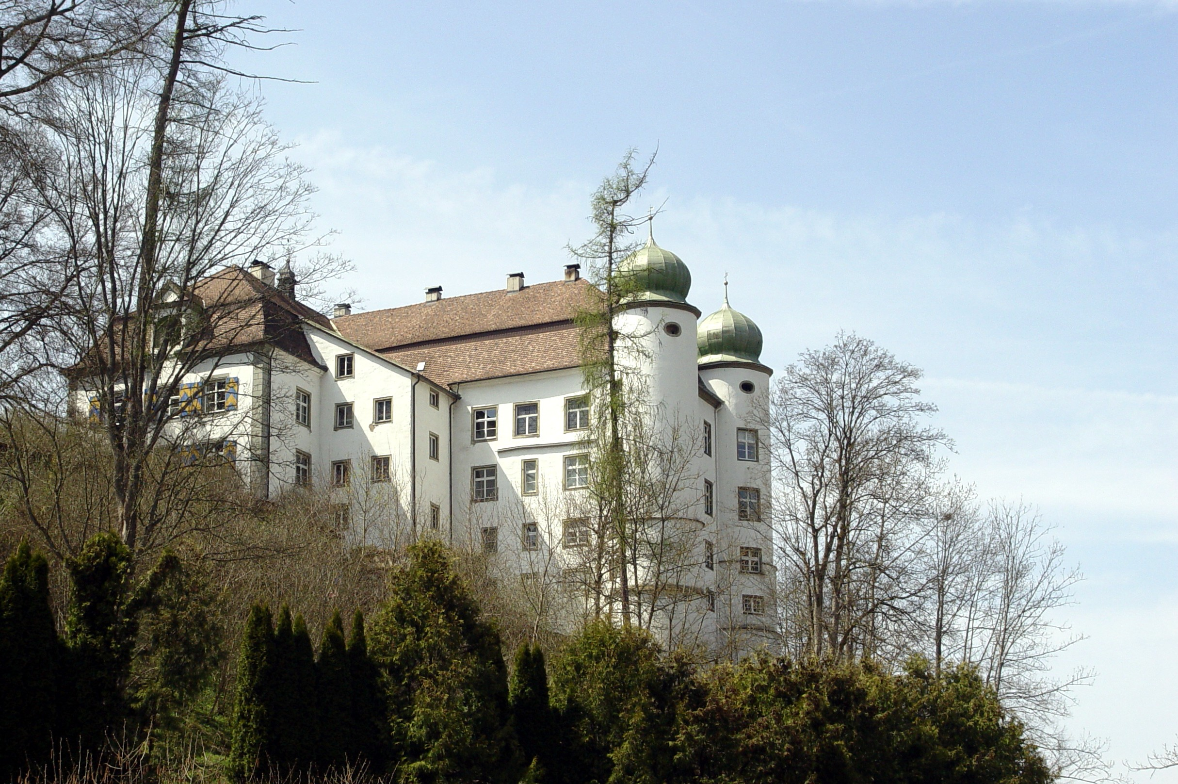 Schloss in Mühlheim an der Donau